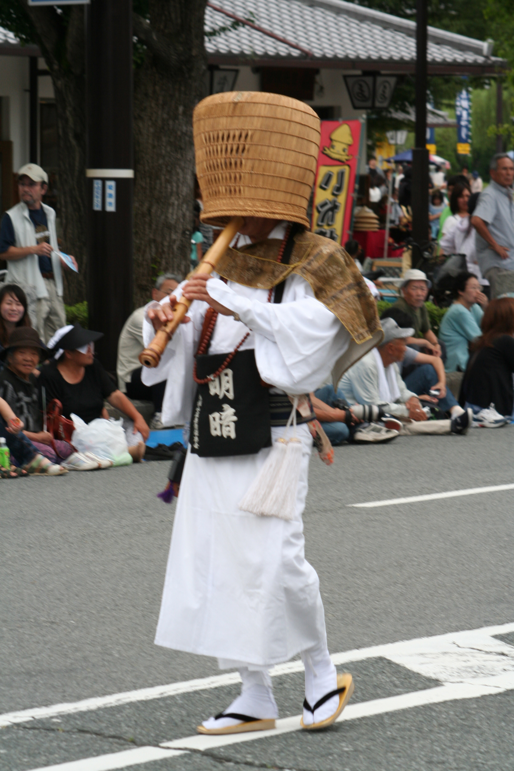 姫路お城祭。兵庫県姫路市にて毎年7月末から8月2日の3日間に渡り姫路城の南部大手前通りにて開催される祭である。第60回開催の2日目の祭の様子。